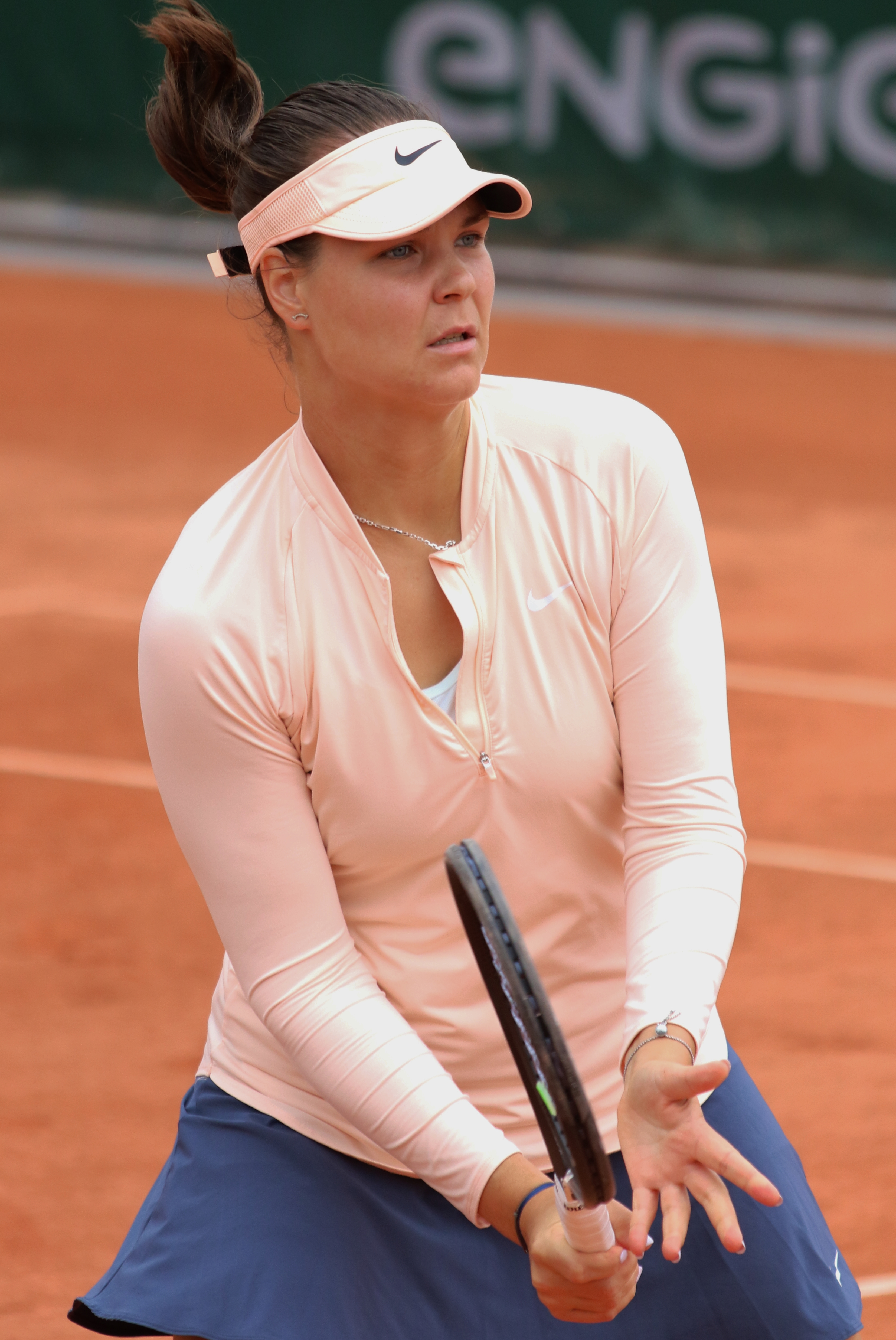 Marozava RG18 (3)